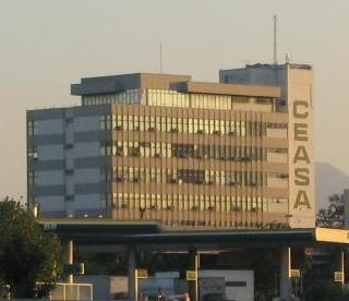 Comércio de horti-fruti, localizado na avenida Brasil Photographer: Nelson Cravo Junior